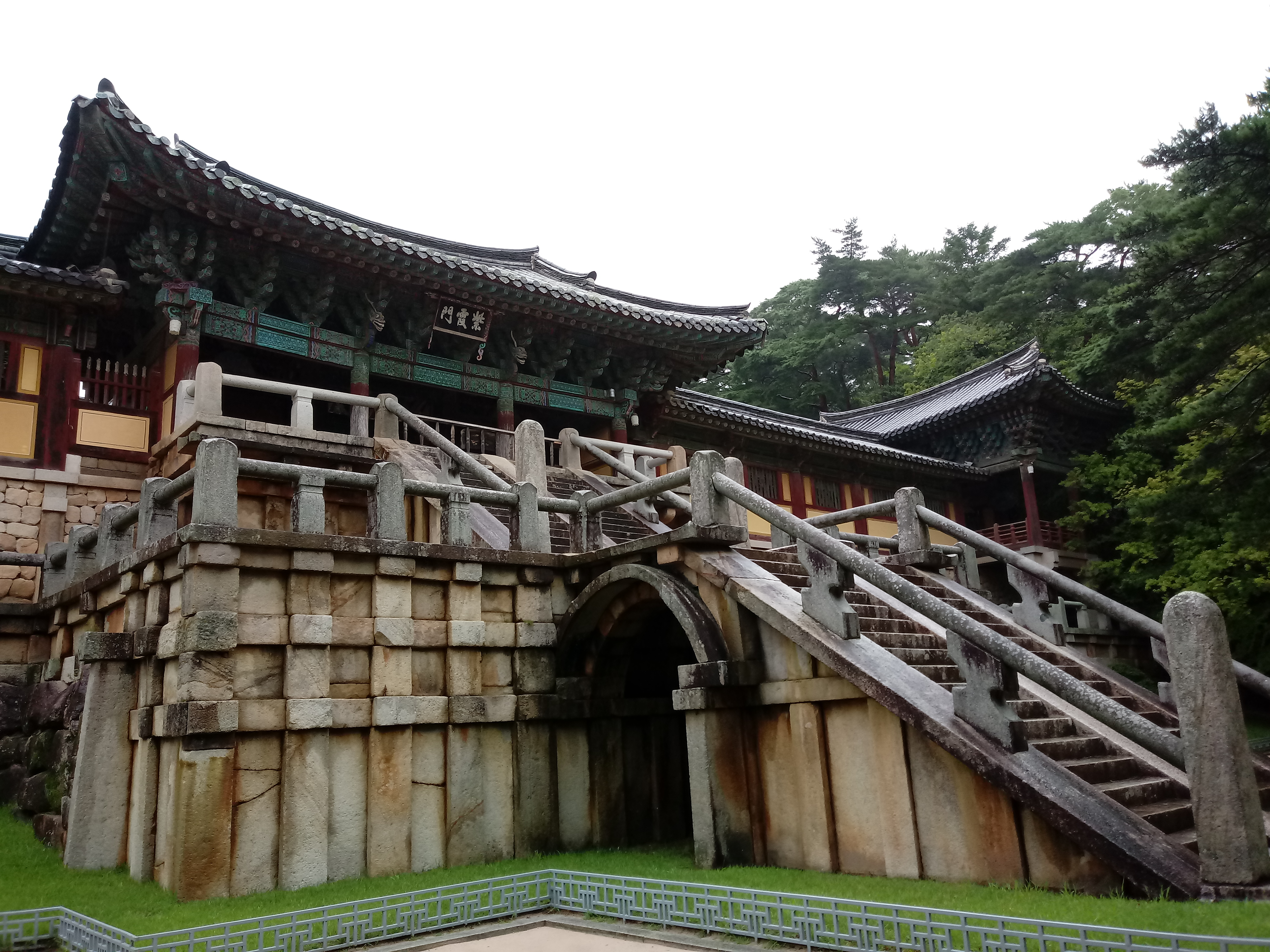 불국사 청운교, 백운교